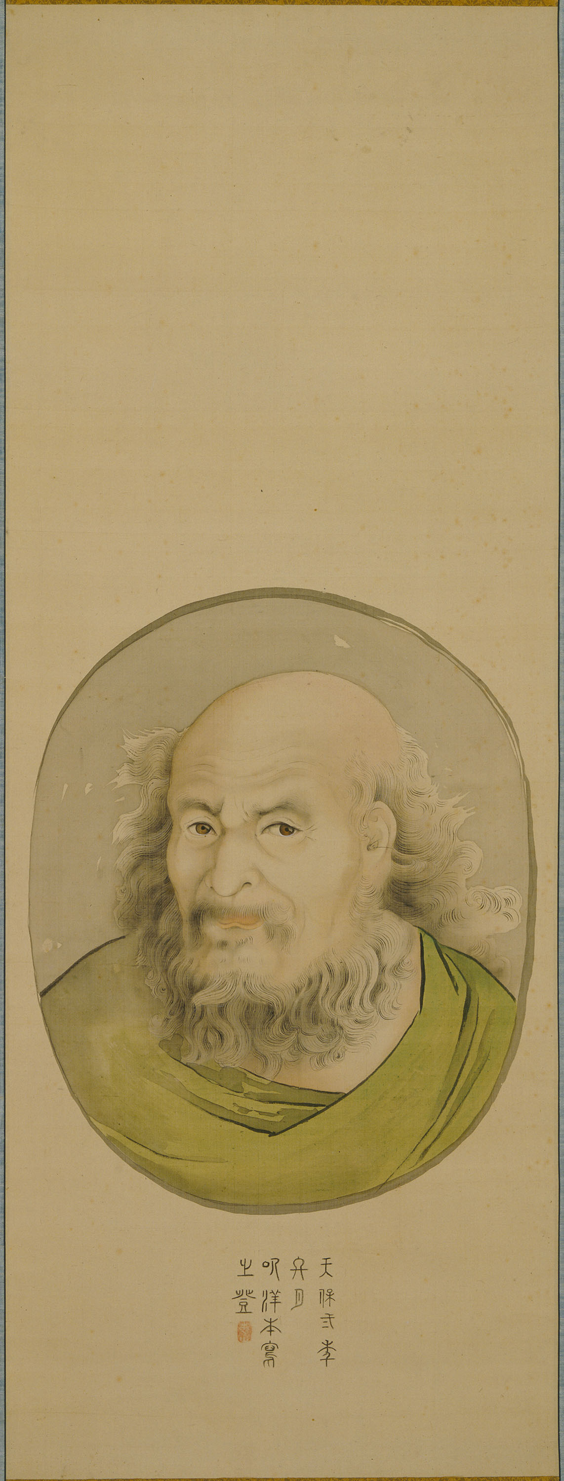 渡辺崋山筆『ヒポクラテス像』（重要美術品）、天保11年（1840年）の作。